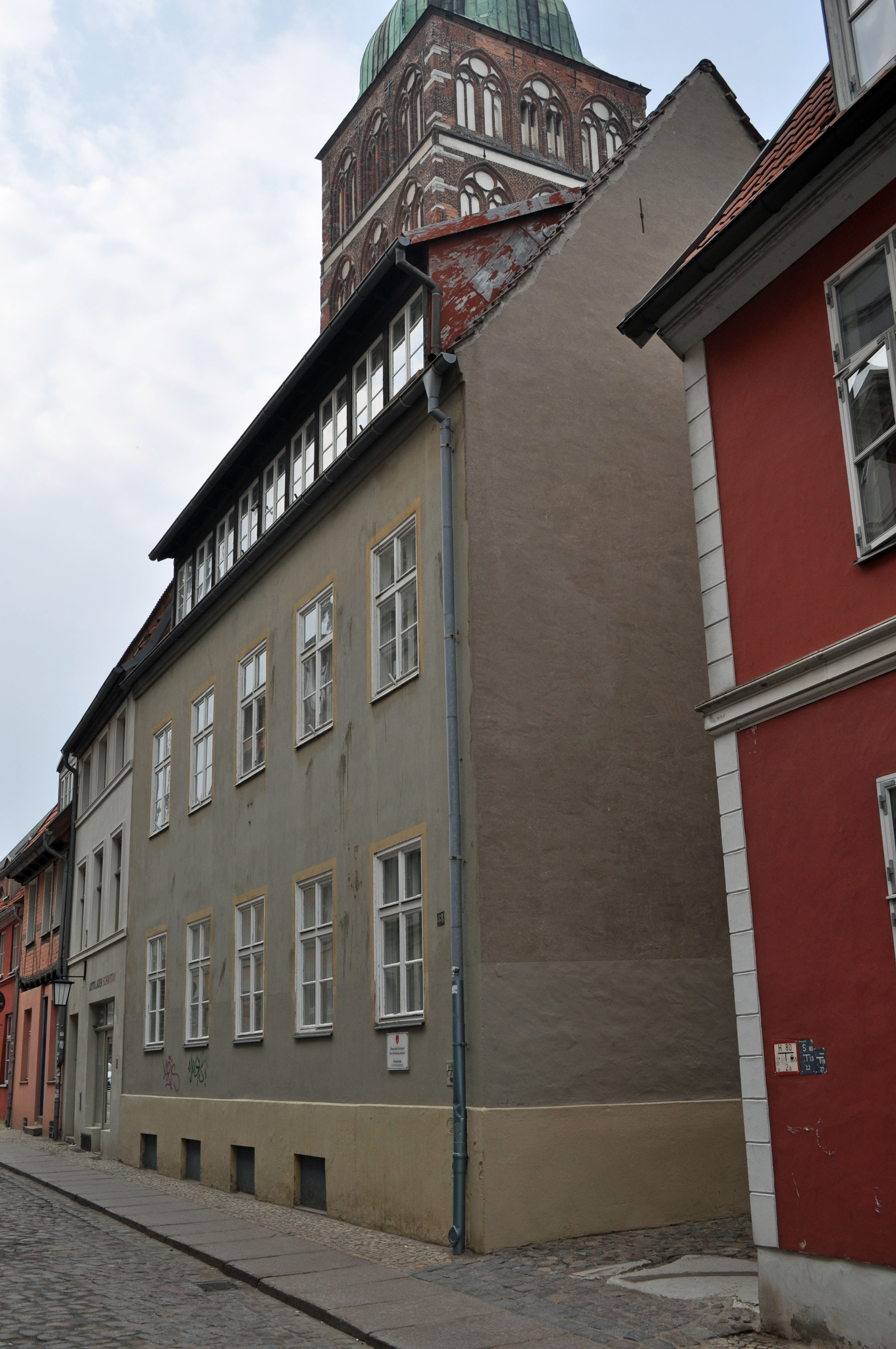 Gebäude bzw. Gebäudedetail in Stralsund. Straße und Hausnummer siehe Dateiname.